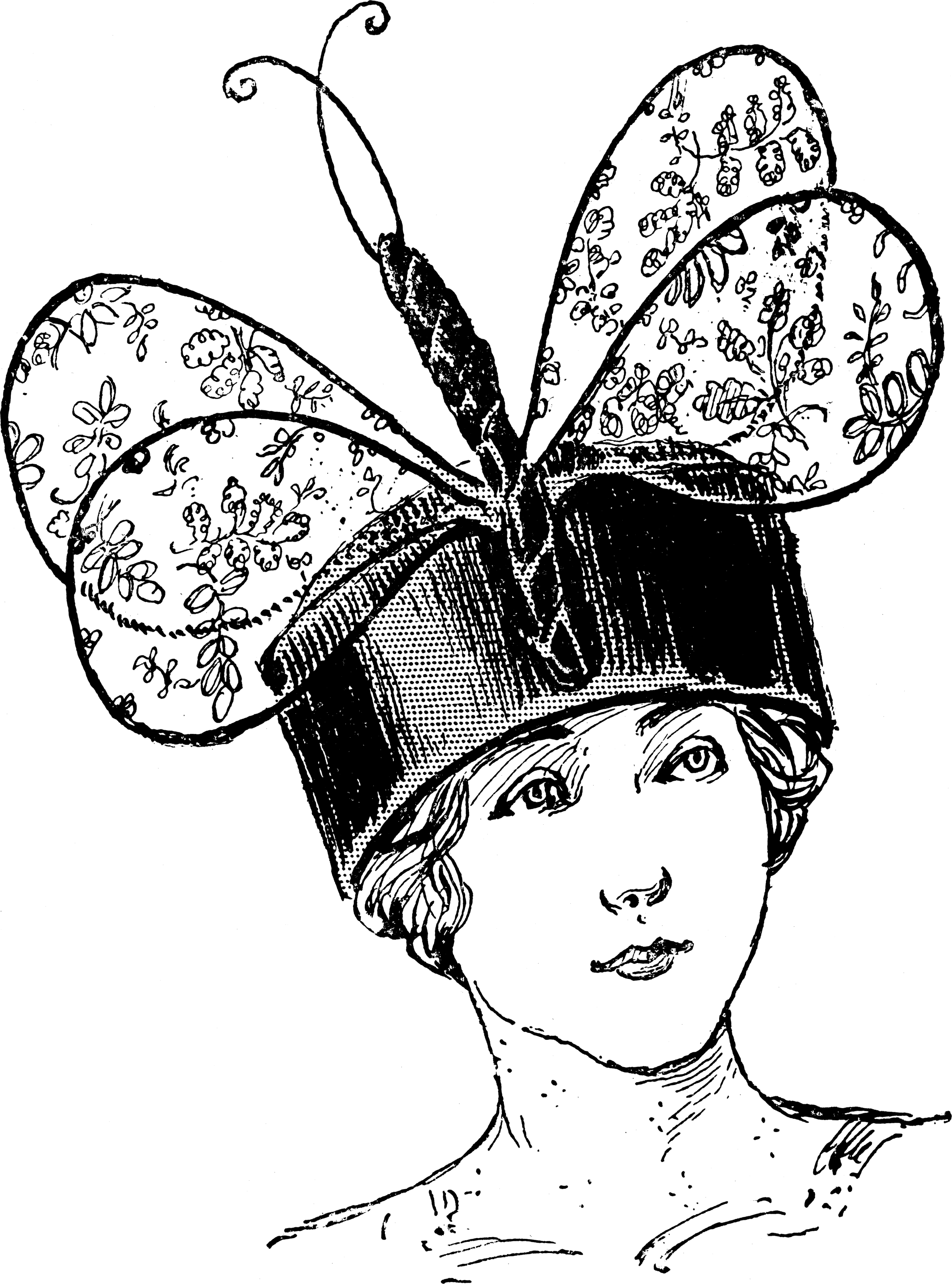 A La Parisienne